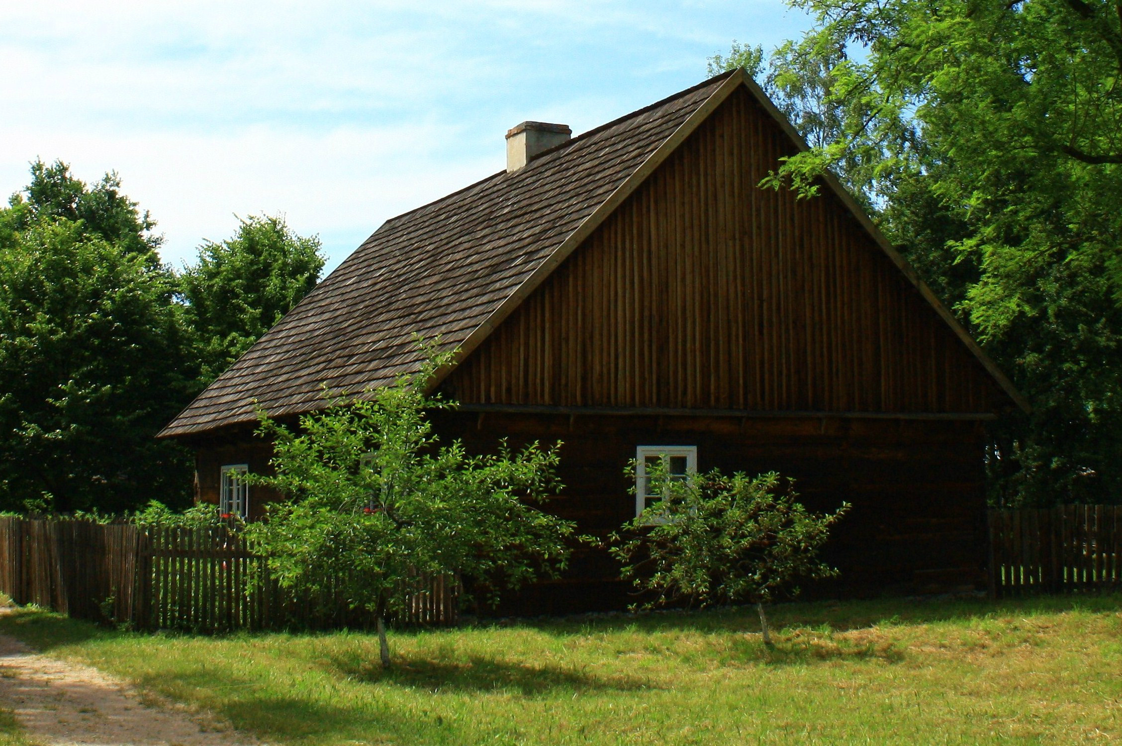 Opole, Park Etnograficzny, chałupa ze Sternalic (przełom XVII i XVIII wieku).